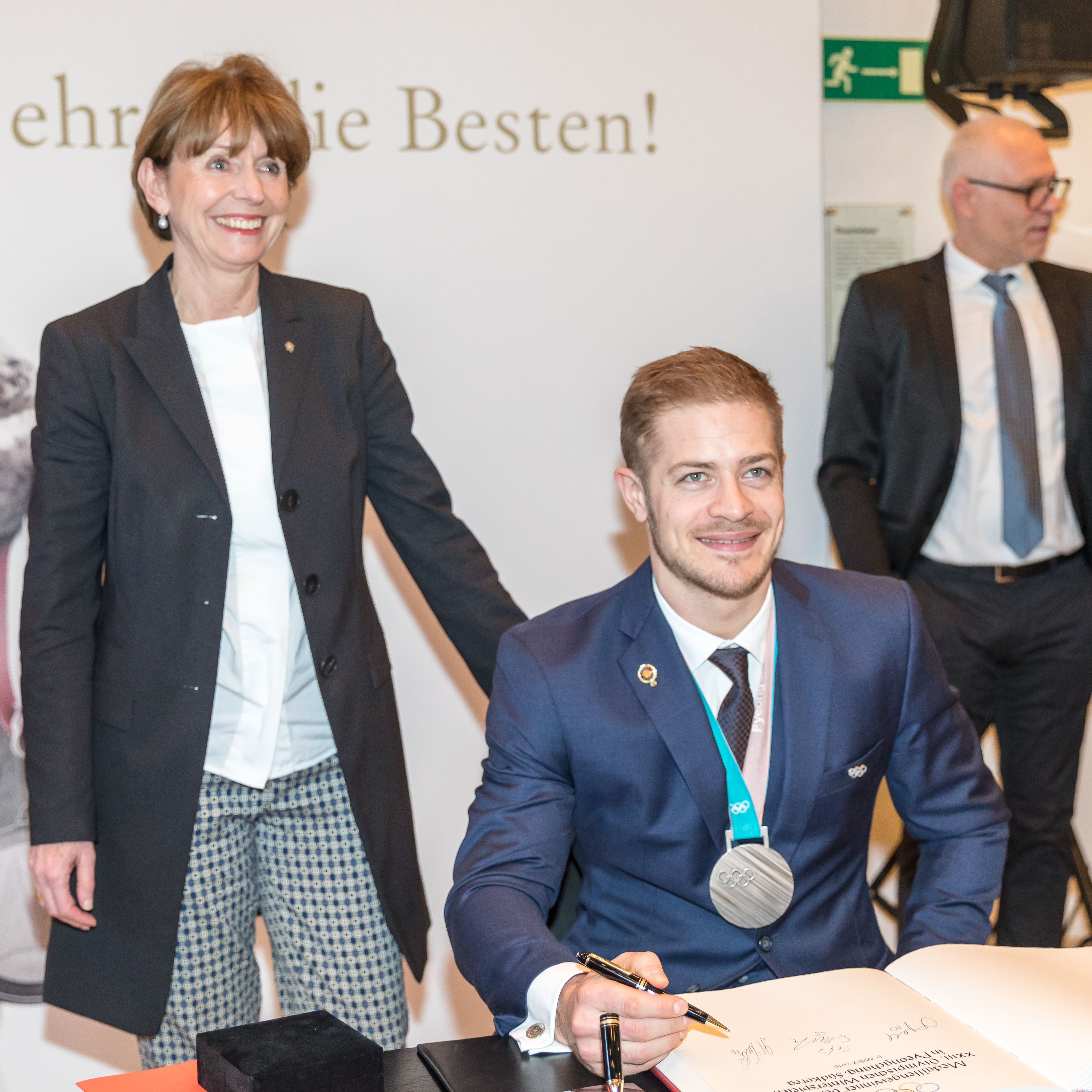 Empfang Medaillengewinner XXIII. Olympische Winterspiele im Rathaus Köln